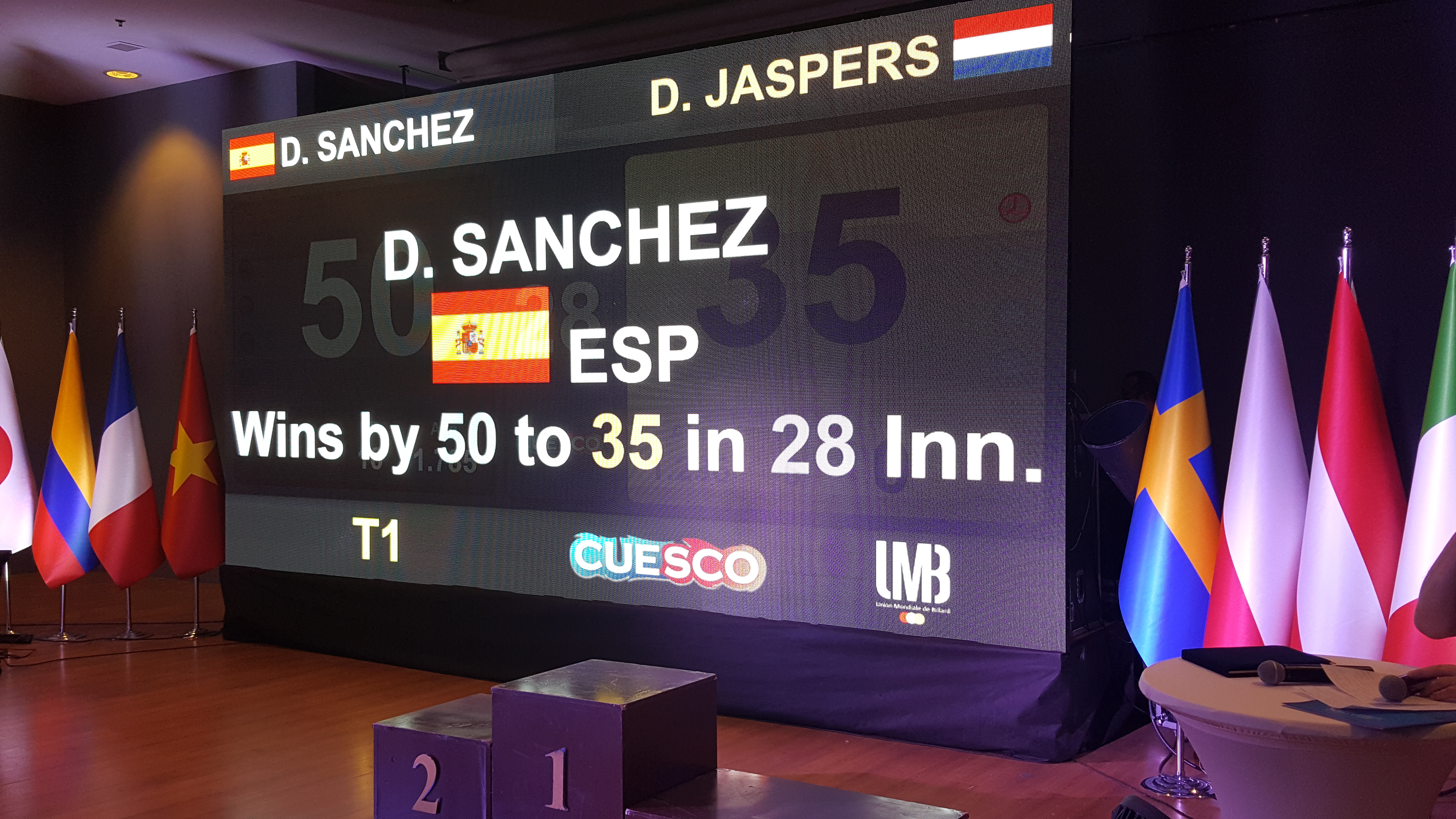 Anzeigetafel Finale